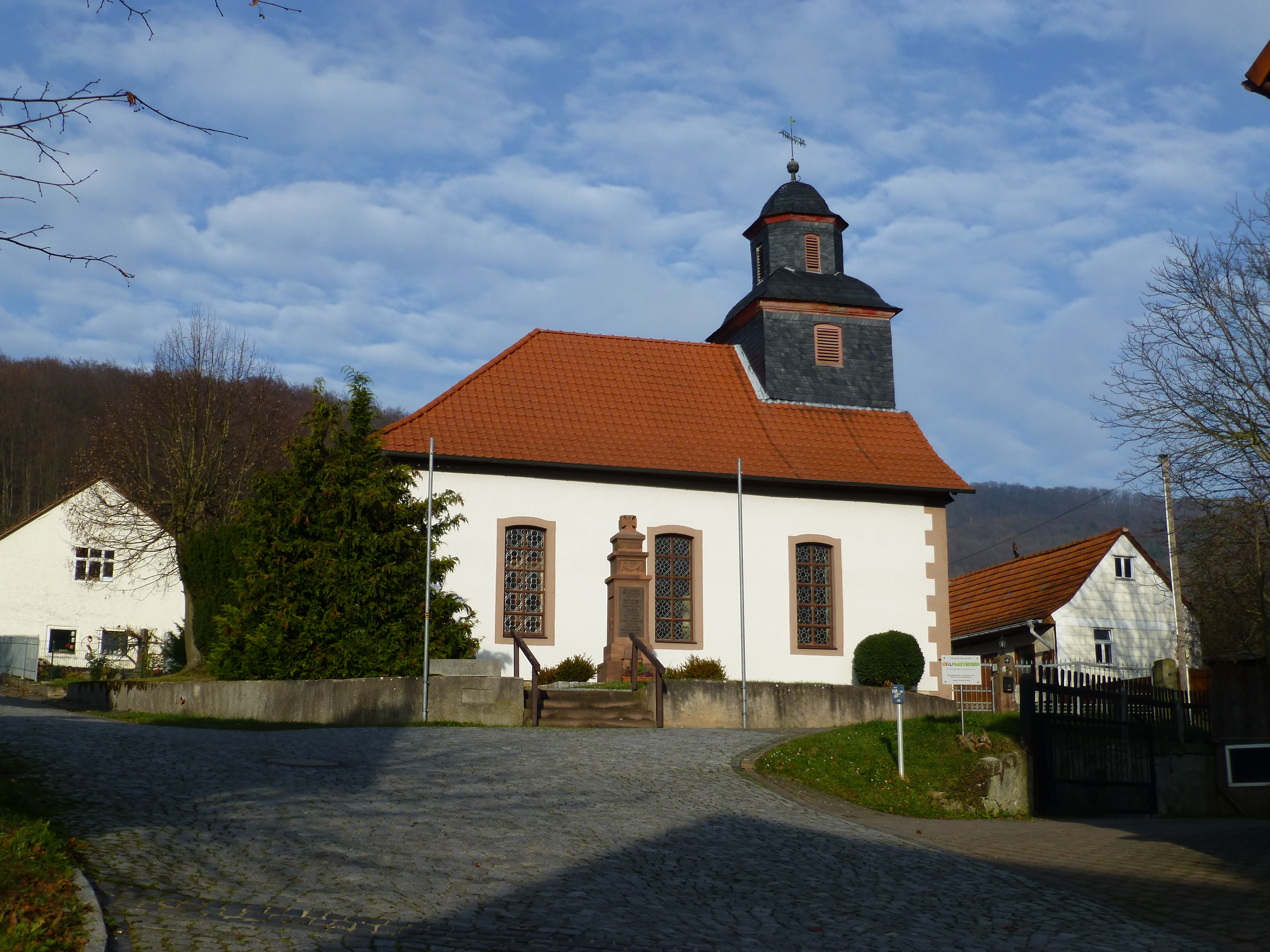 Die Kirche in Asbach